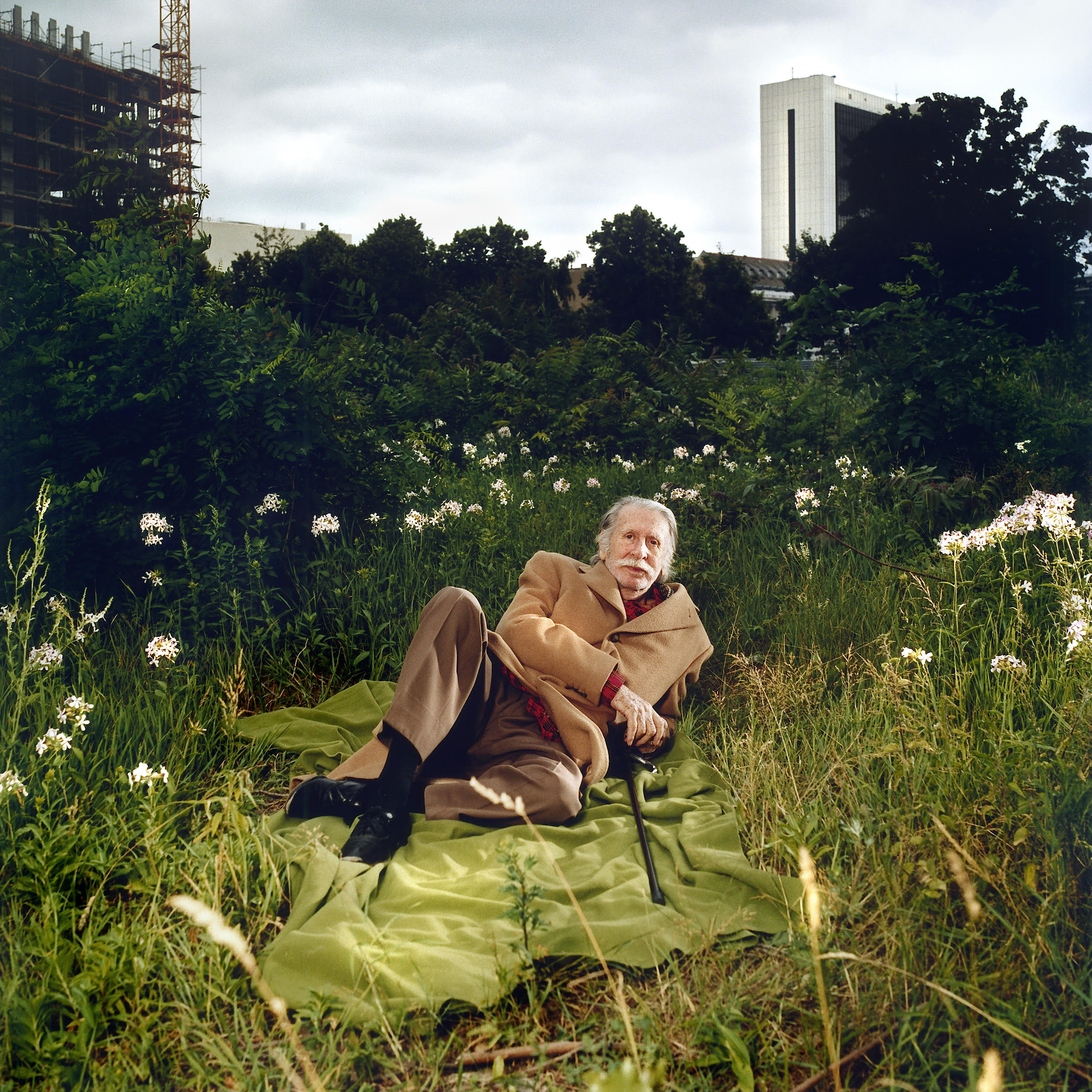 George Tabori porträtiert von Oliver Mark, Berlin 2003